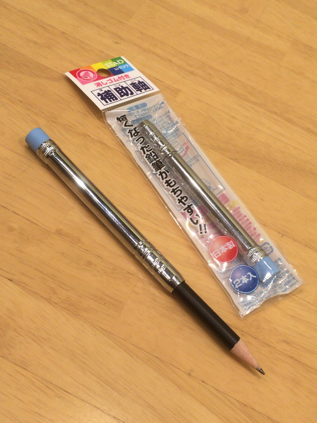 クツワ STAD 補助軸 ゴム付 RH003